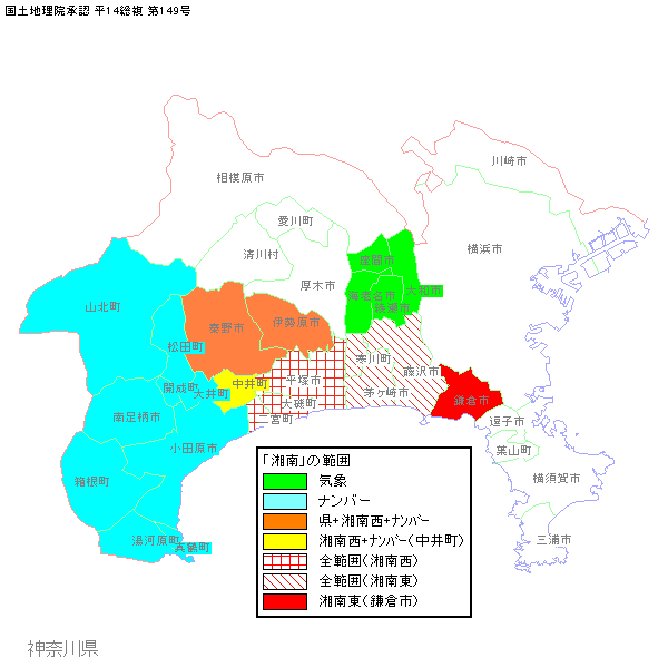 「湘南」の範囲